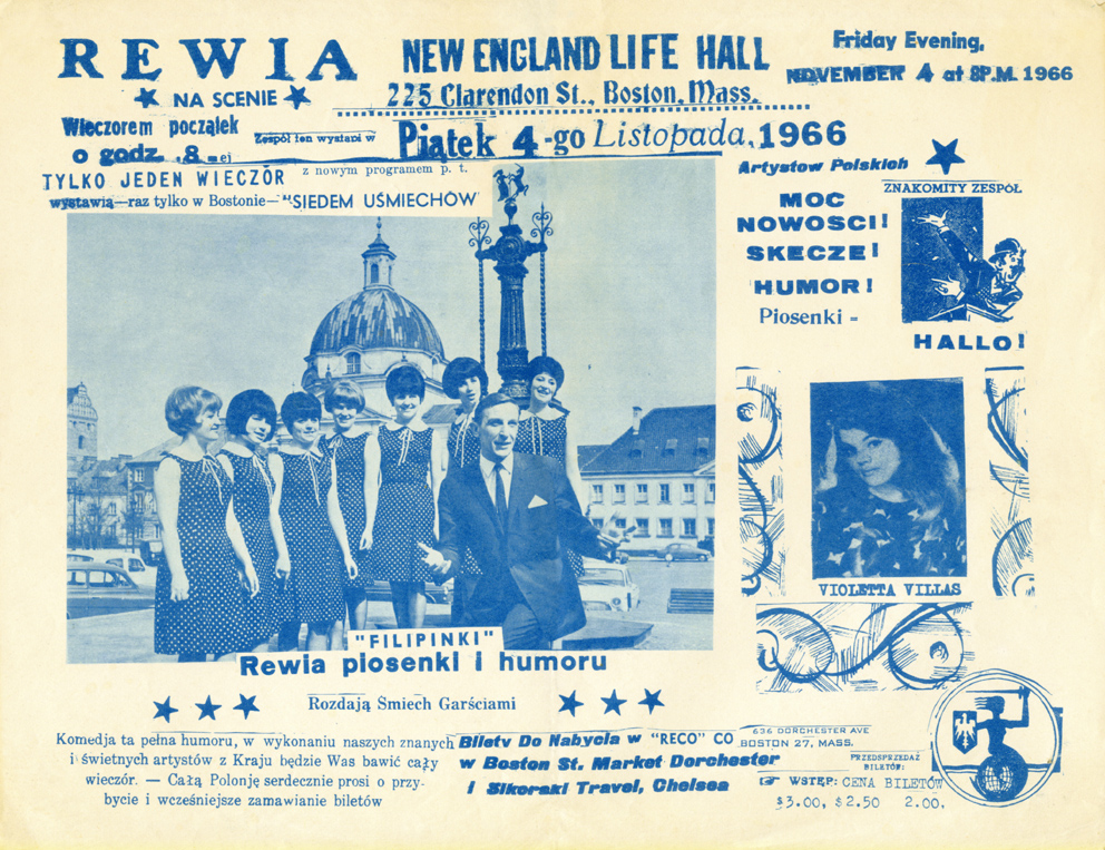 Plakat reklamujący występ Filipinek w ramach trasy „Siedem uśmiechów” jesienią 1966 r. w Stanach Zjednoczonych i Kanadzie